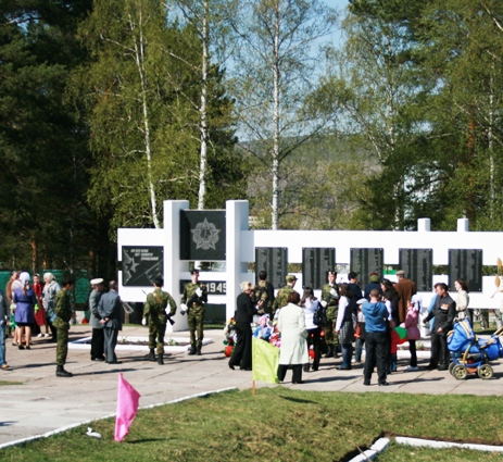 Памятник участникам войны 1941-45 гг. 9 мая 2009 г.